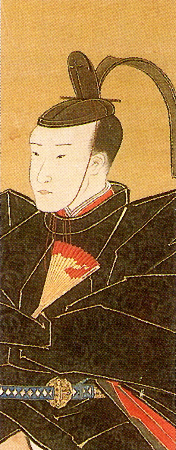 細川治年の肖像(部分)。